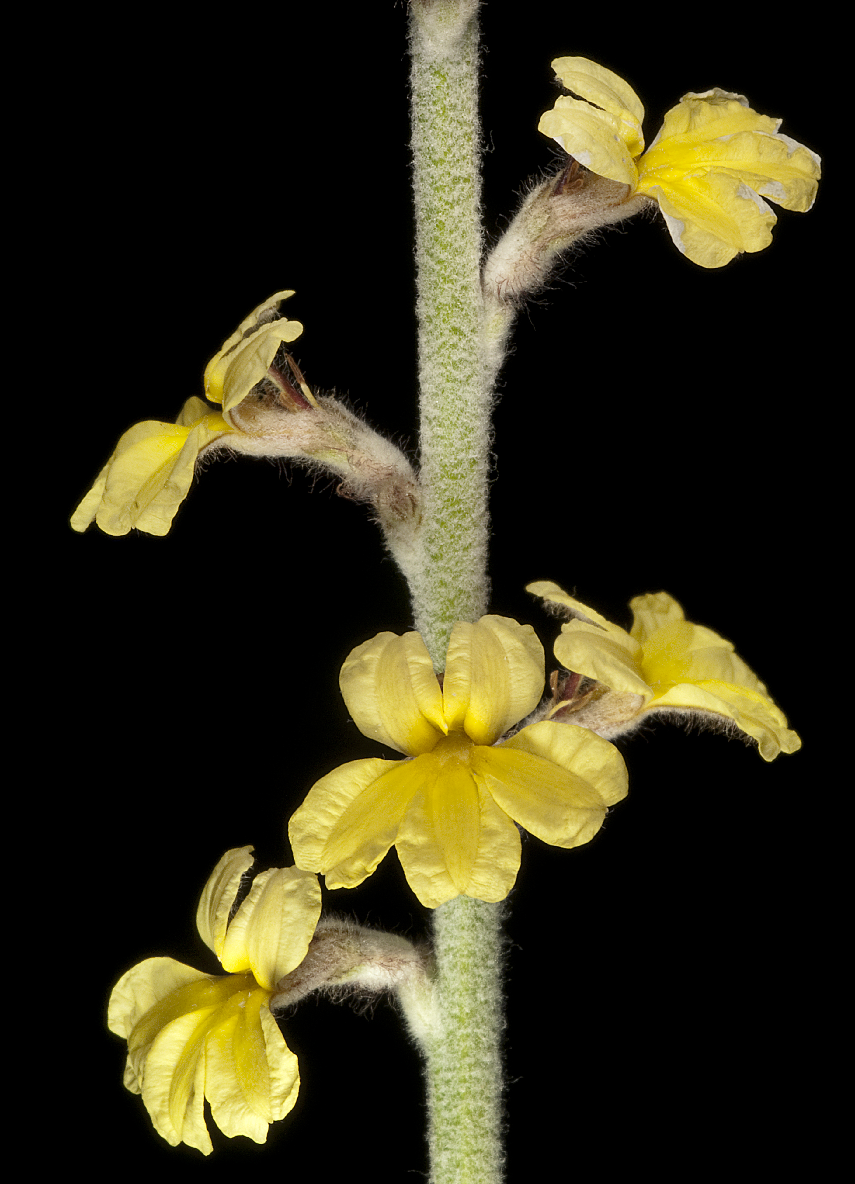 KRT4012